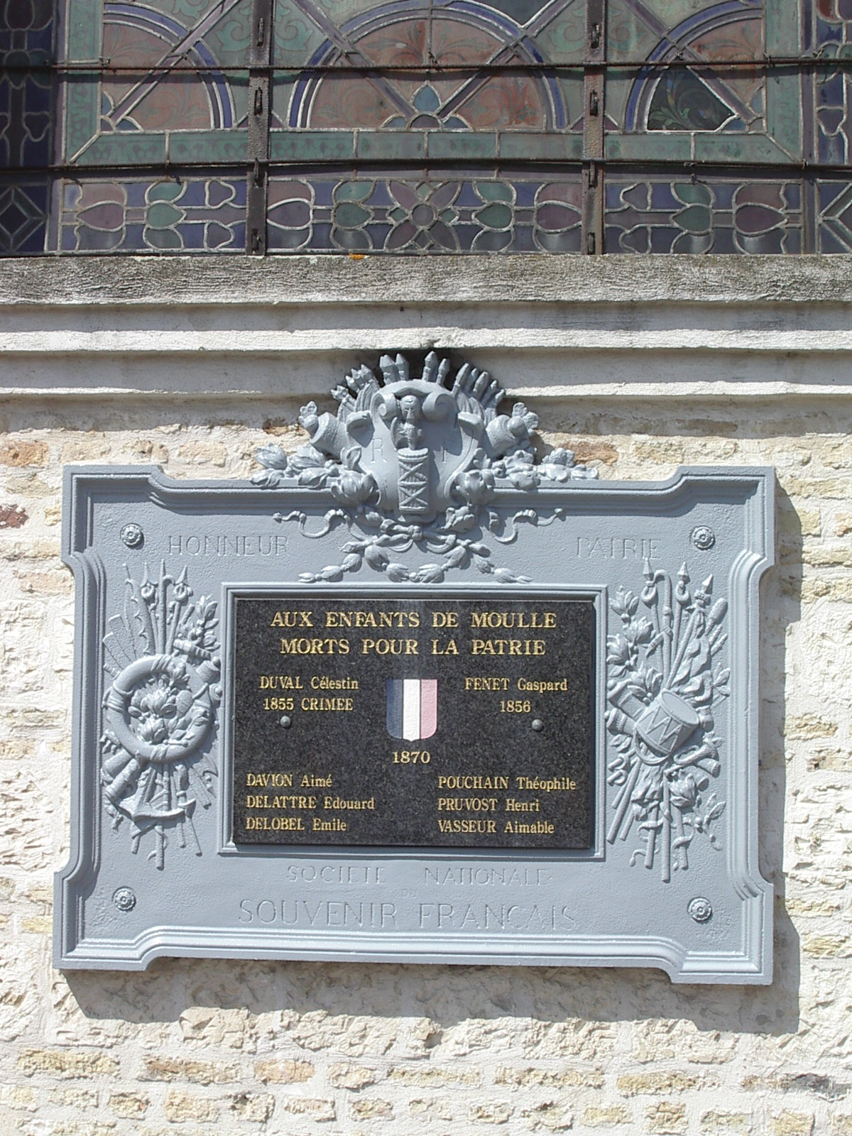 Plaque commémorative des victimes de la guerre de Crimée et de 1870, sur un des murs de l'église